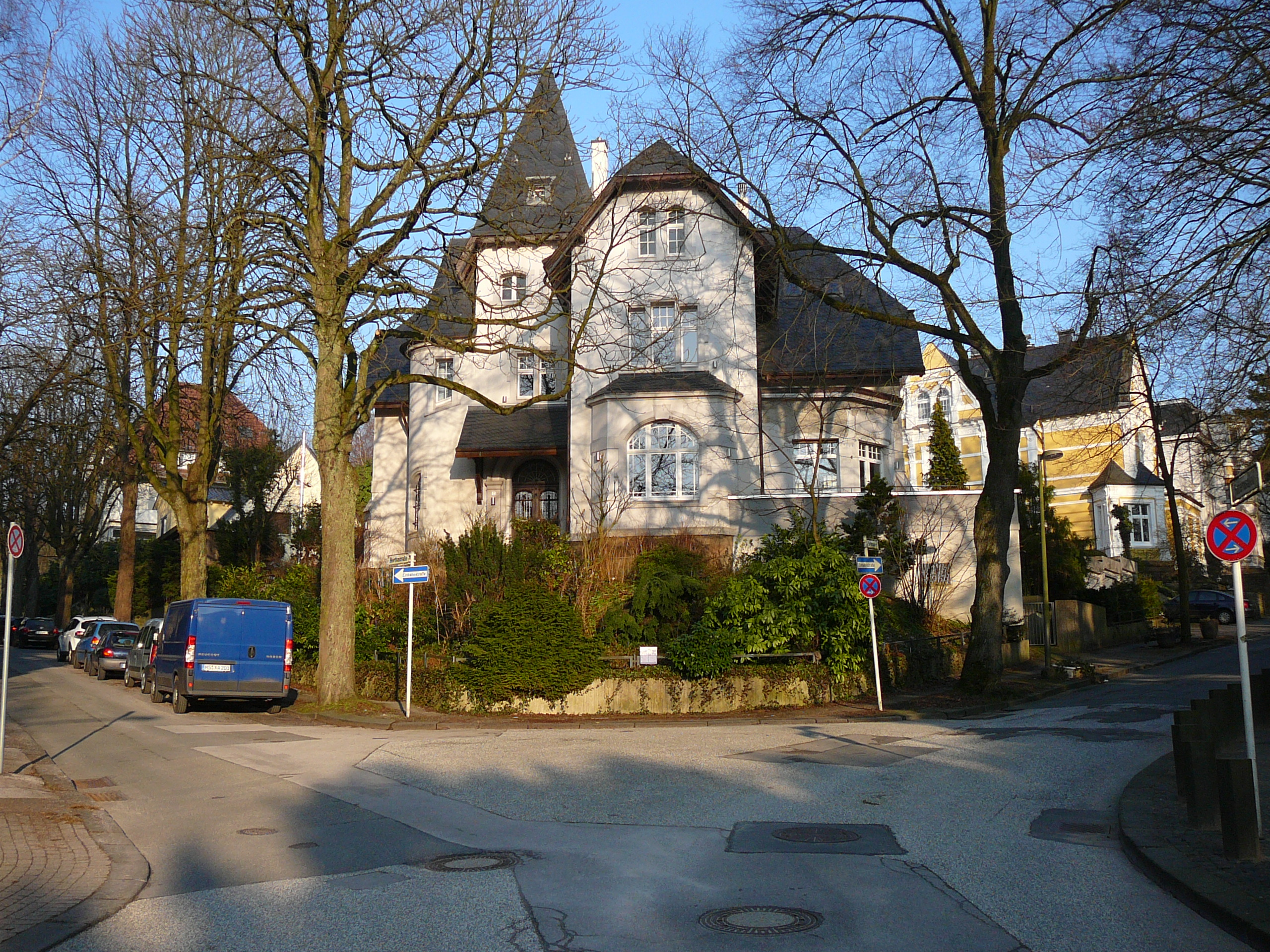 Hubertusallee, Wuppertal